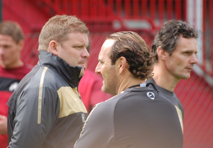 Hein Vanhaezebrouck, Yves Vanderhaeghe en Francky Vandendriessche